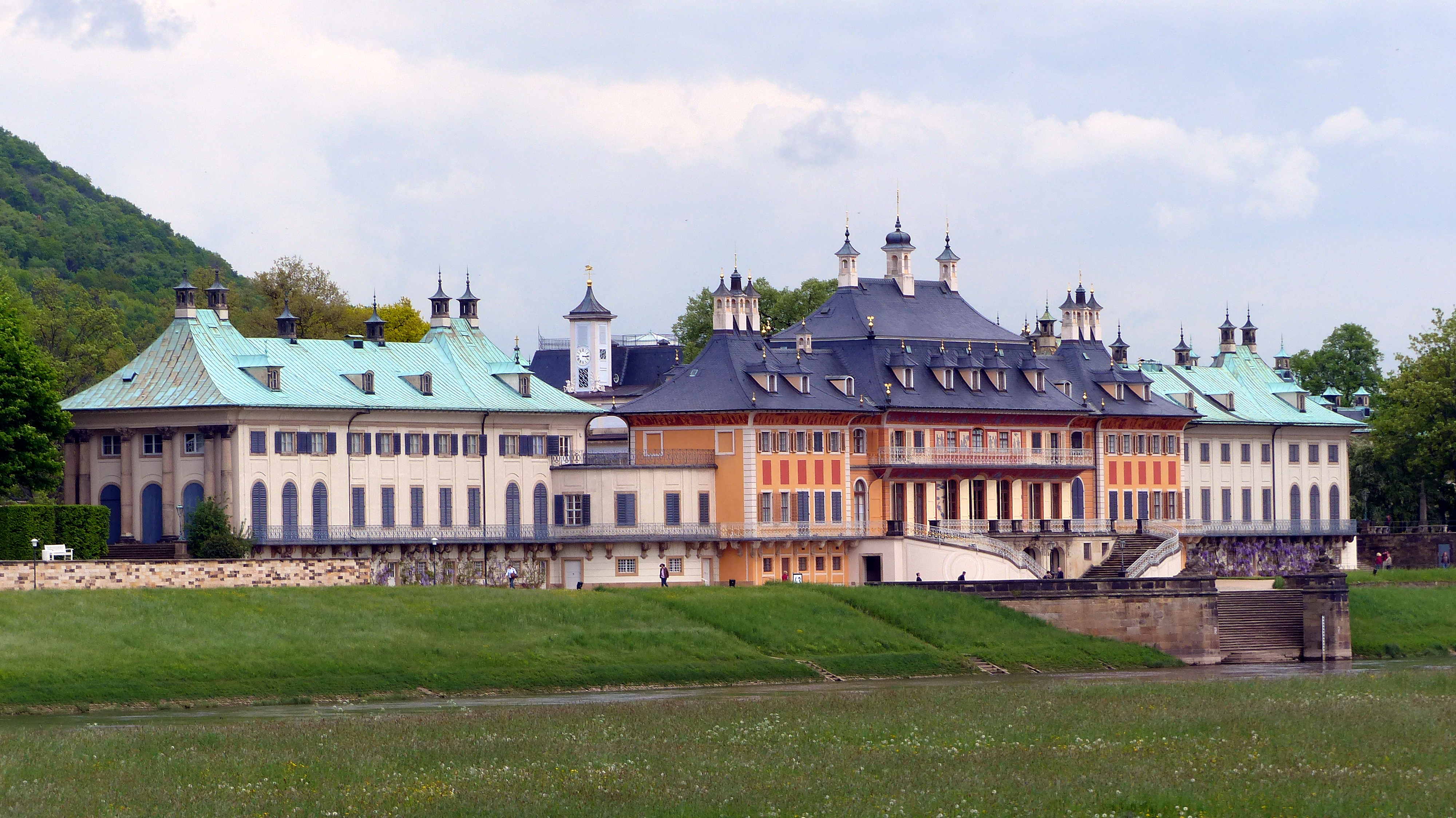 Schloss Pillnitz von der Elbseite, Dresden